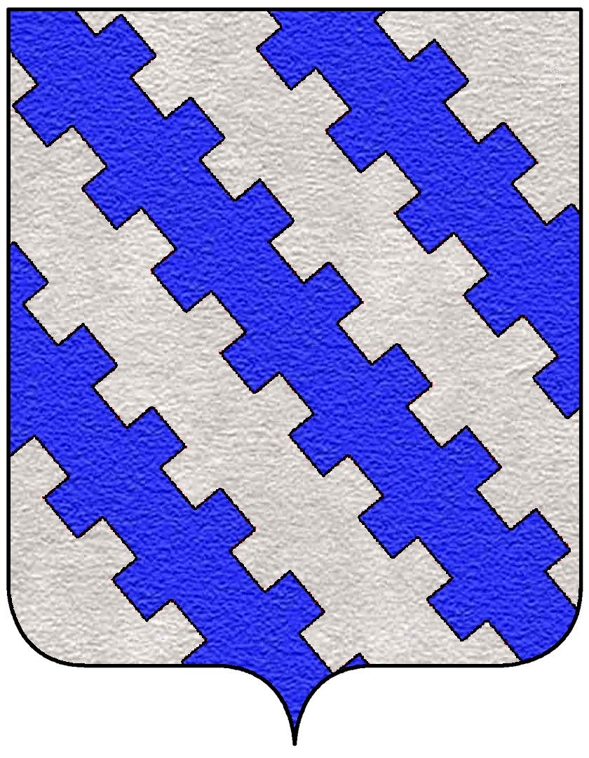 Stemma della famiglia Benci